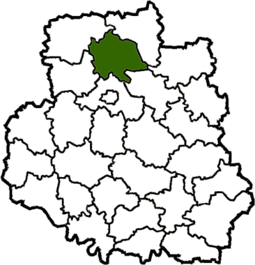 Kalynivskyi-Raion map